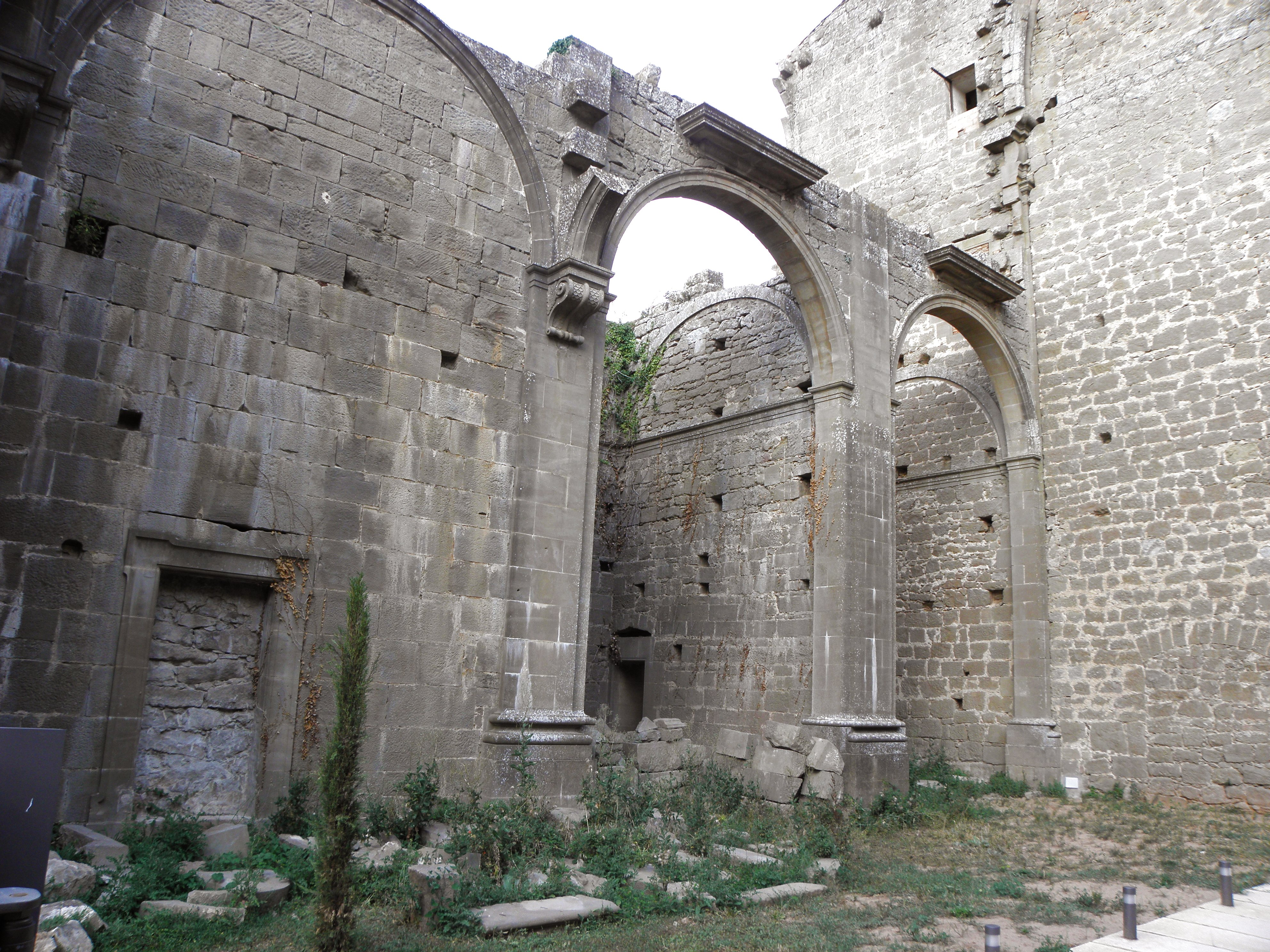 La part inacabada de l'església del Santuari del Miracle (Riner, Solsonès)